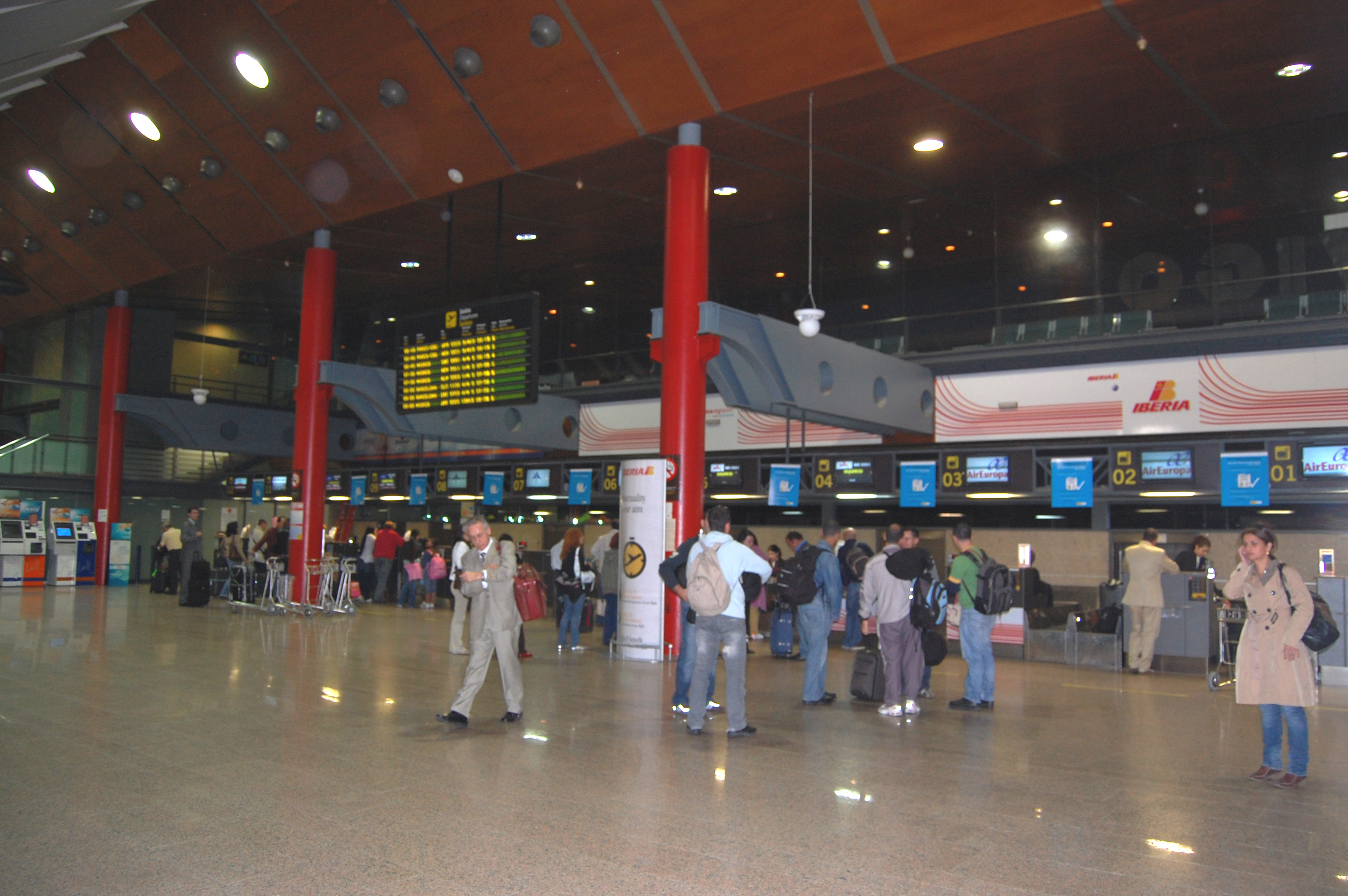 Balcões do Aeroporto de Vigo (Peinador), Galiza, Espanha.